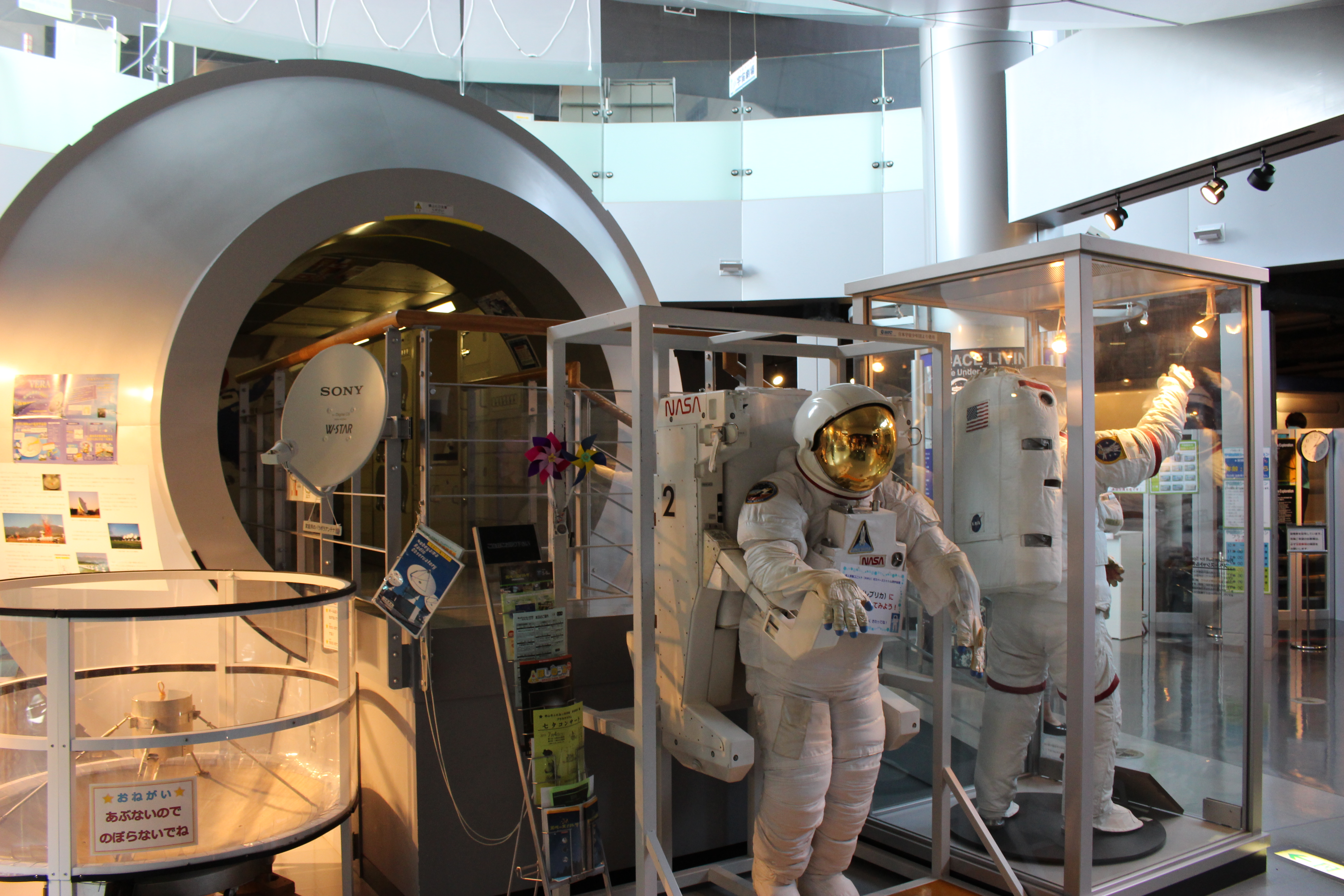 郡山市ふれあい科学館展示ゾーン